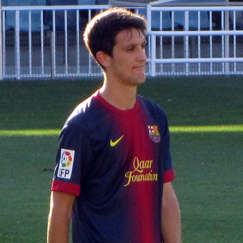 Luis Alberto Romero Alconchel in a 2012/13 FC Barcelona/FC Bacelona B home kit. Foto realizada por Javier Segura (@castroquini)